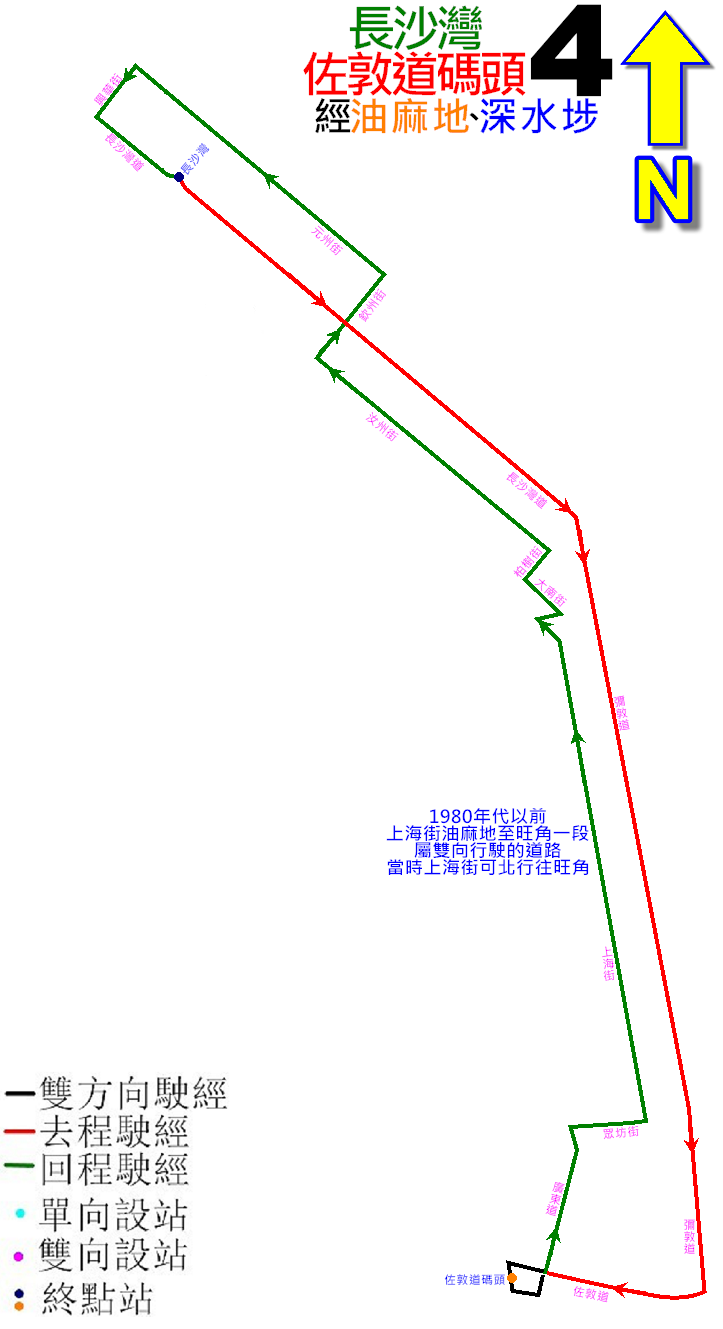 中文（香港）: 九巴4號線(1983年取消前)的走線圖